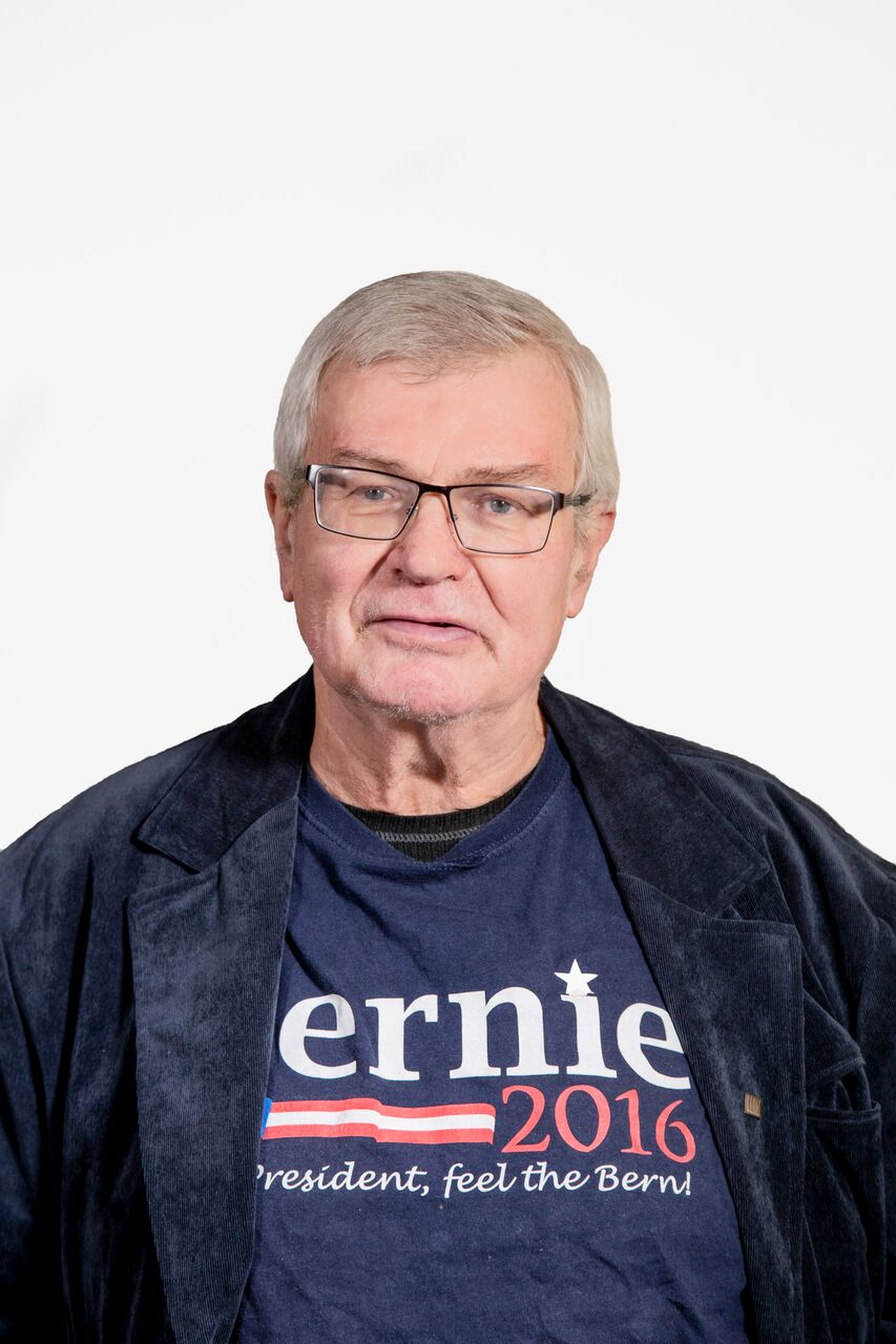 Olev Remsu sotside valimiskampaania ajal.